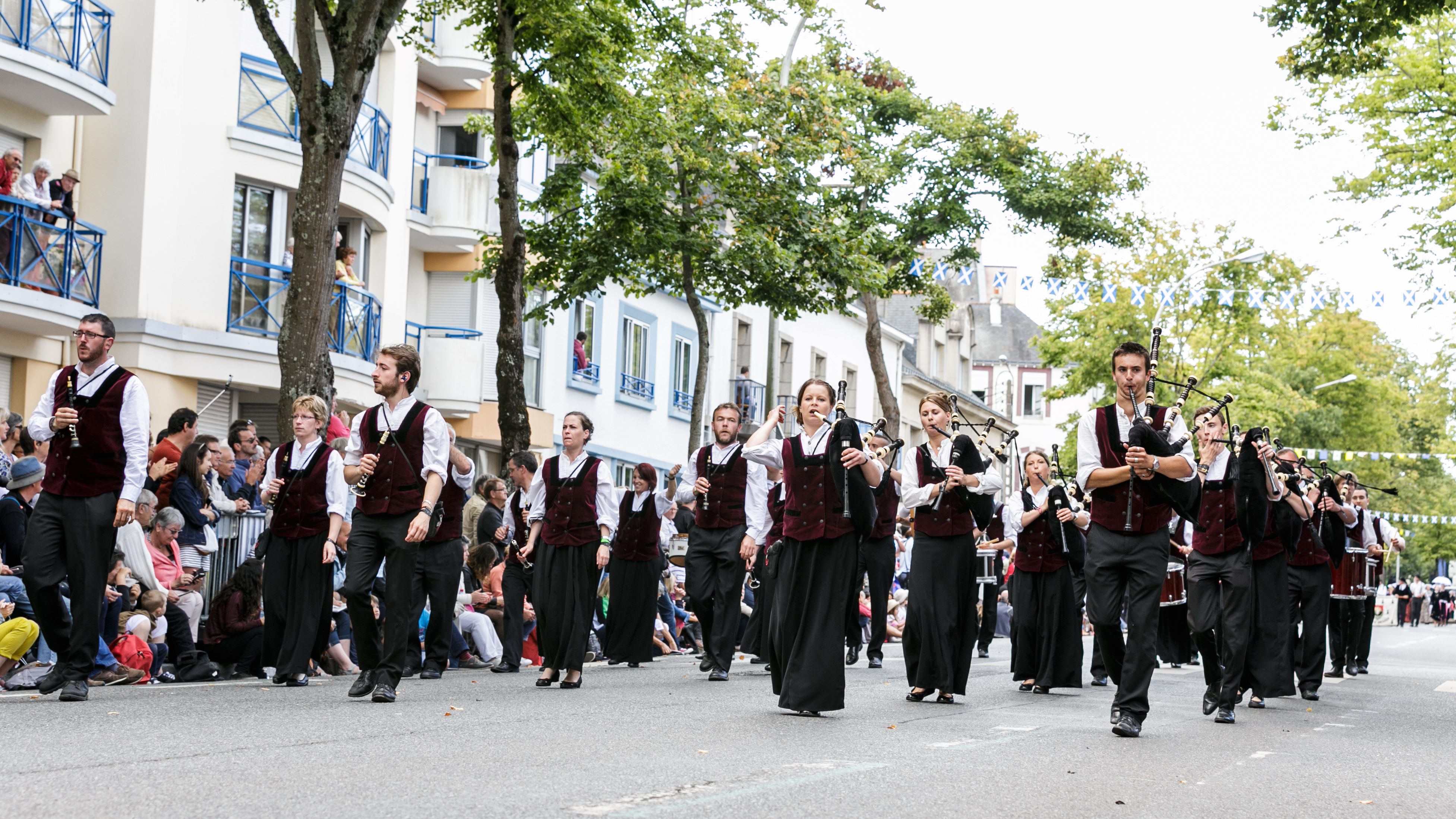 Festival Interceltique de Lorient 2017 - Grande parade des nations celtes - Bagad Boulvriag (Bourbriac)